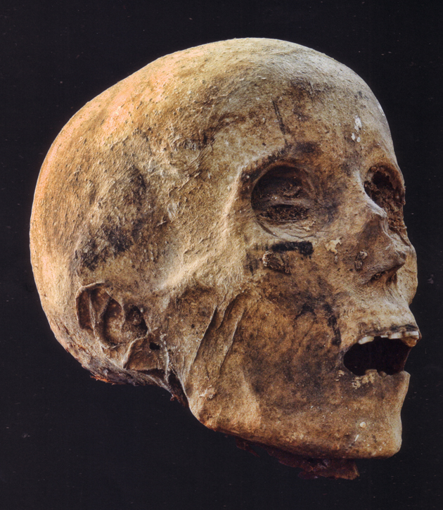 Mumie aus der Gruft der Kirche von Altlichtenwartz